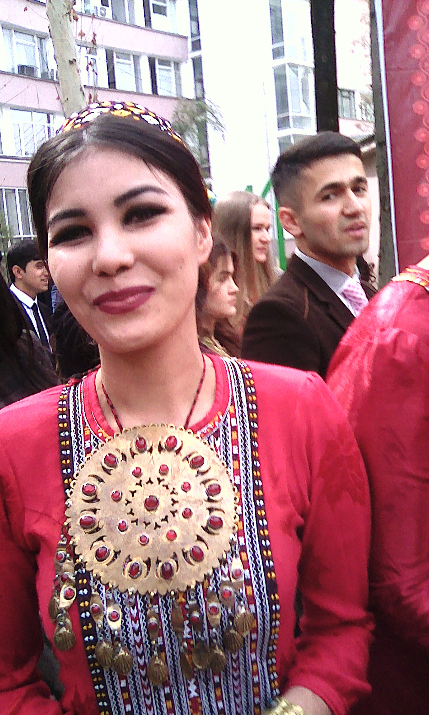 Празднование Навруз в Российско-таджикском славянском университете, г. Душанбе, Таджикистан Тоҷикӣ: Базми Наврӯз дар Донишгоҳи Россия-Тоҷикистон (Славянӣ), ш. Душанбе, Тоҷикистон